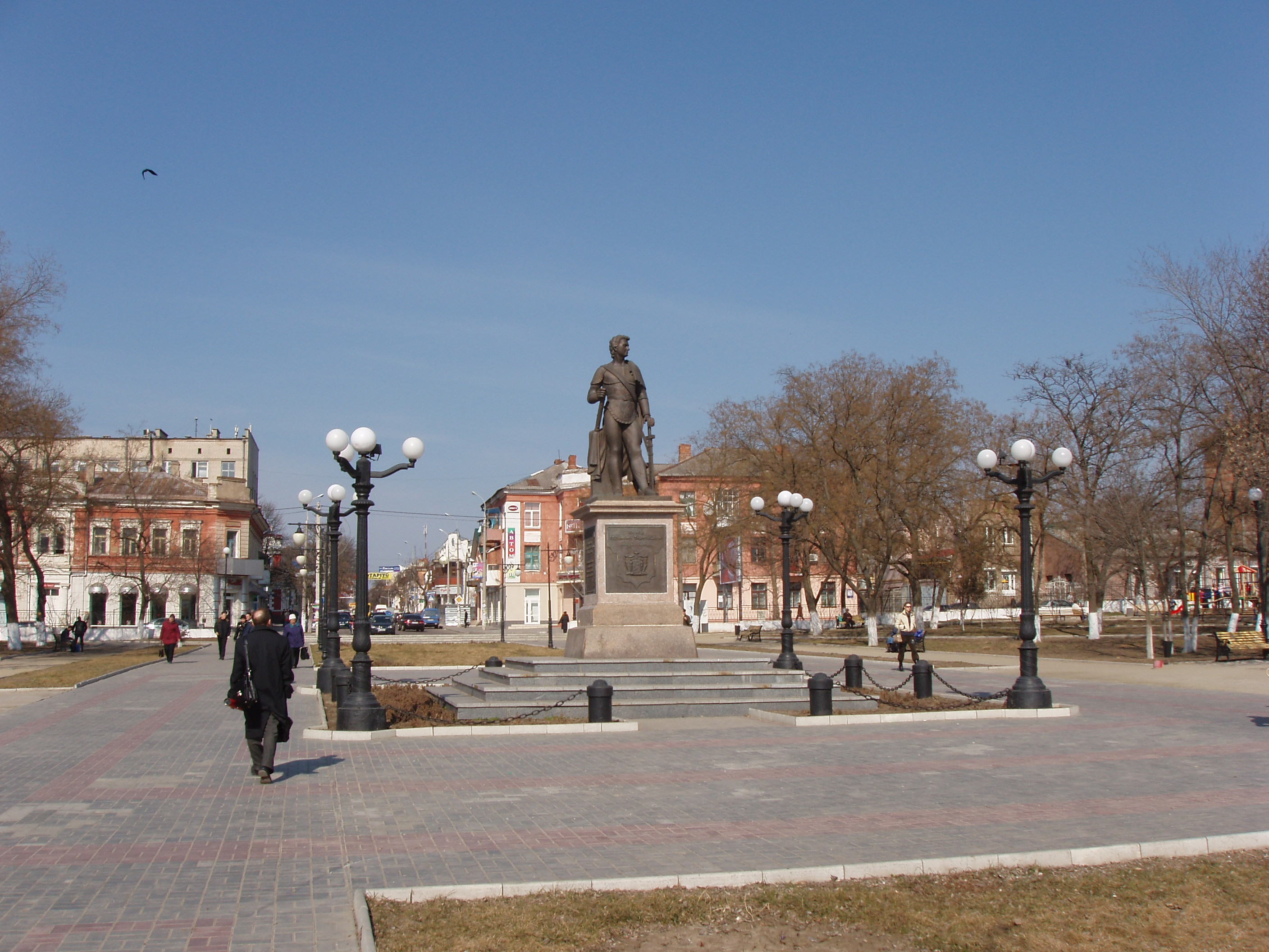 Kherson Potemkin